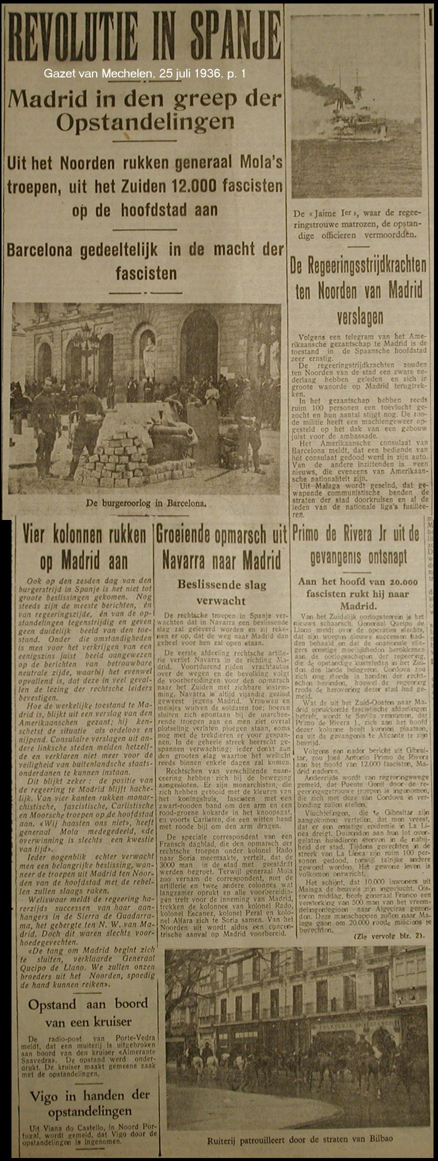 Deze foto is een kopie van blz 1 van de Gazet van Mechelen, de dato 25 juli 1936. De foto is genomen door Marc Alcide in het Stadsarchief van Mechelen op 9 februari 2002